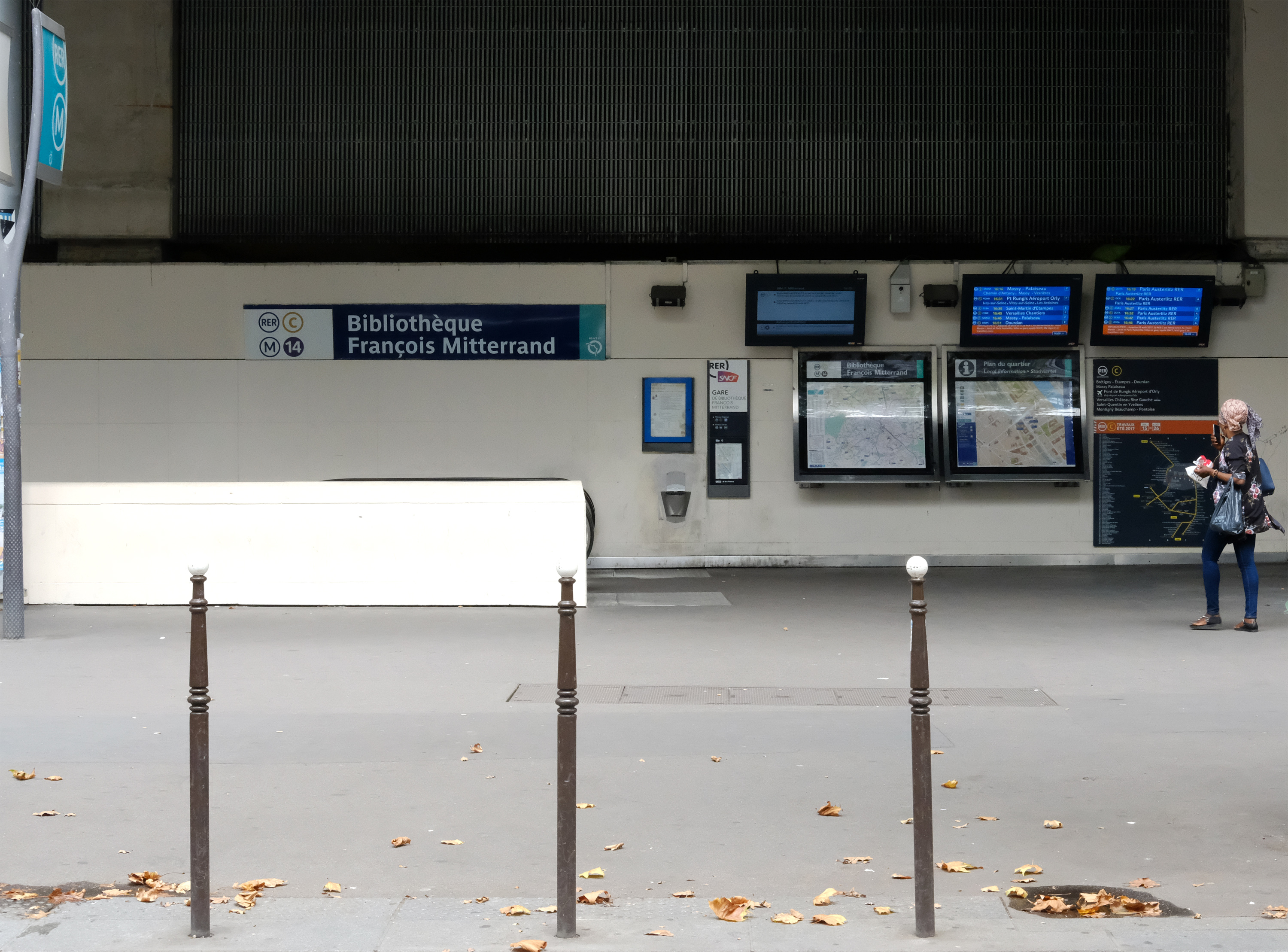 85, Rue du Chevaleret (entrée de la station de métro "Bibliothèque François-Mitterand) - Paris XIII